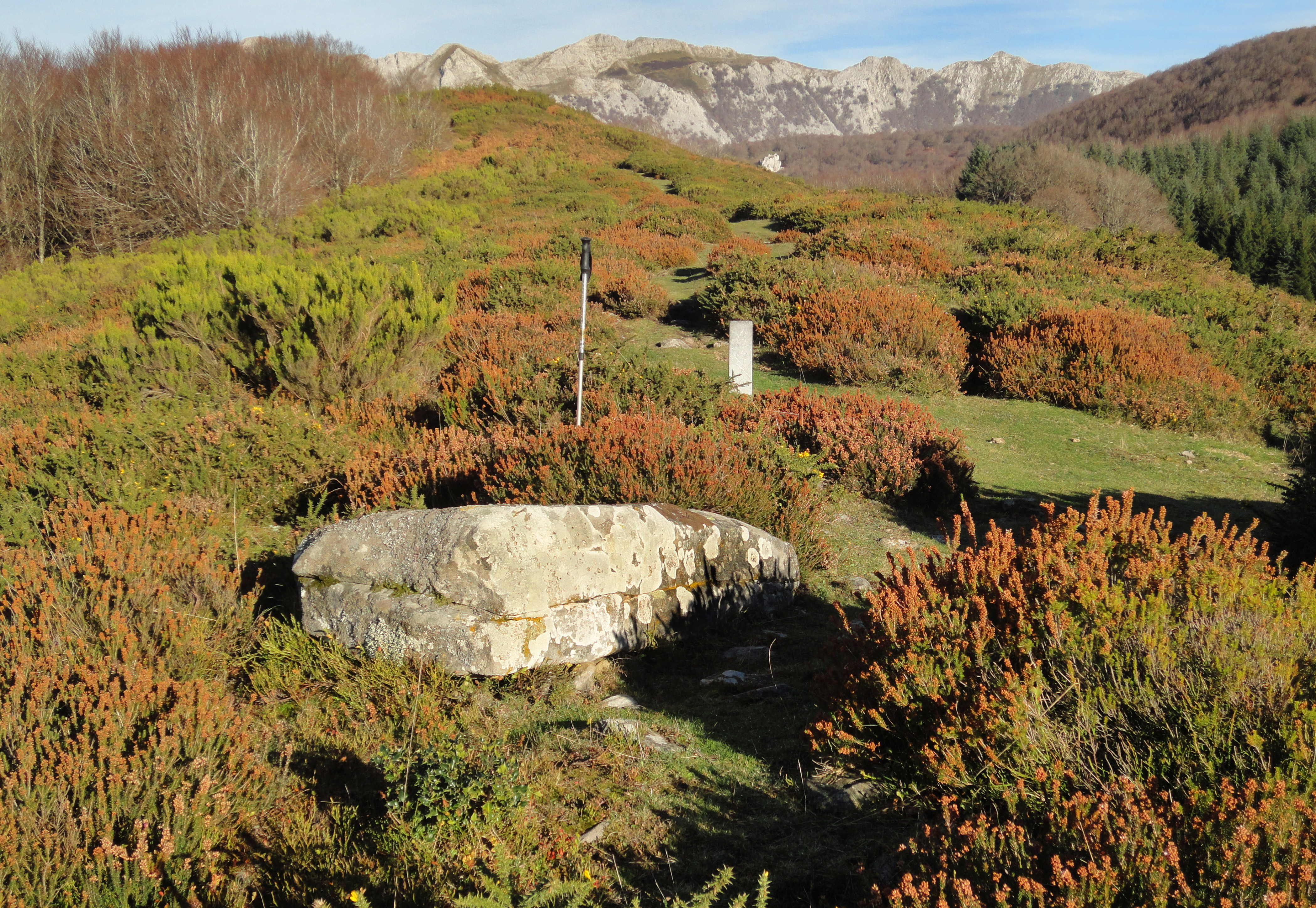 Dolmen Urkitzako lepoa